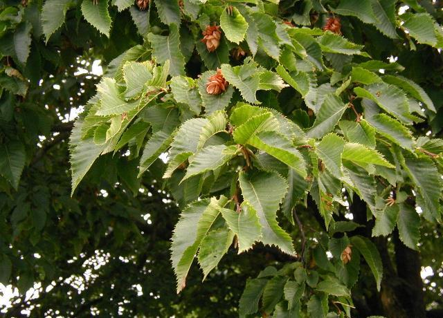 Ostrya carpinifolia